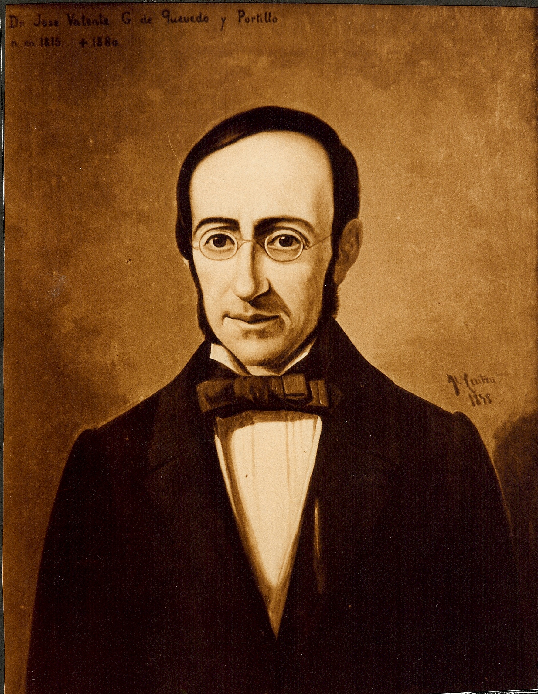 Fotografía de álbum de árbol familiar.